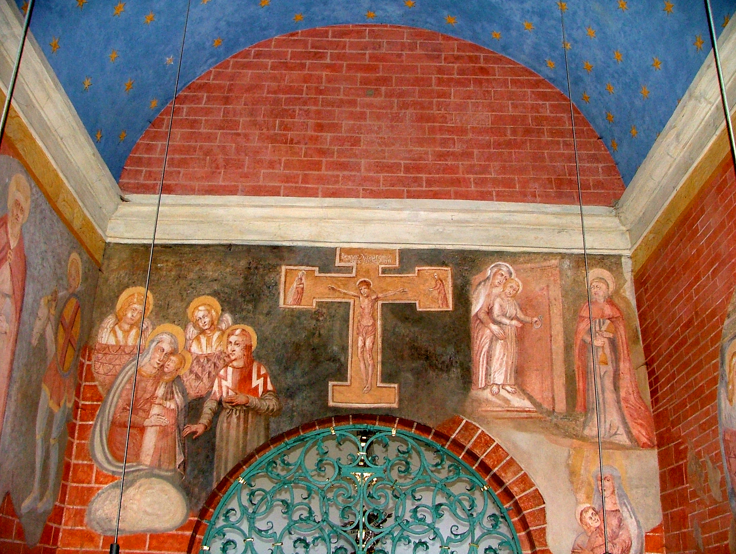 Loreto